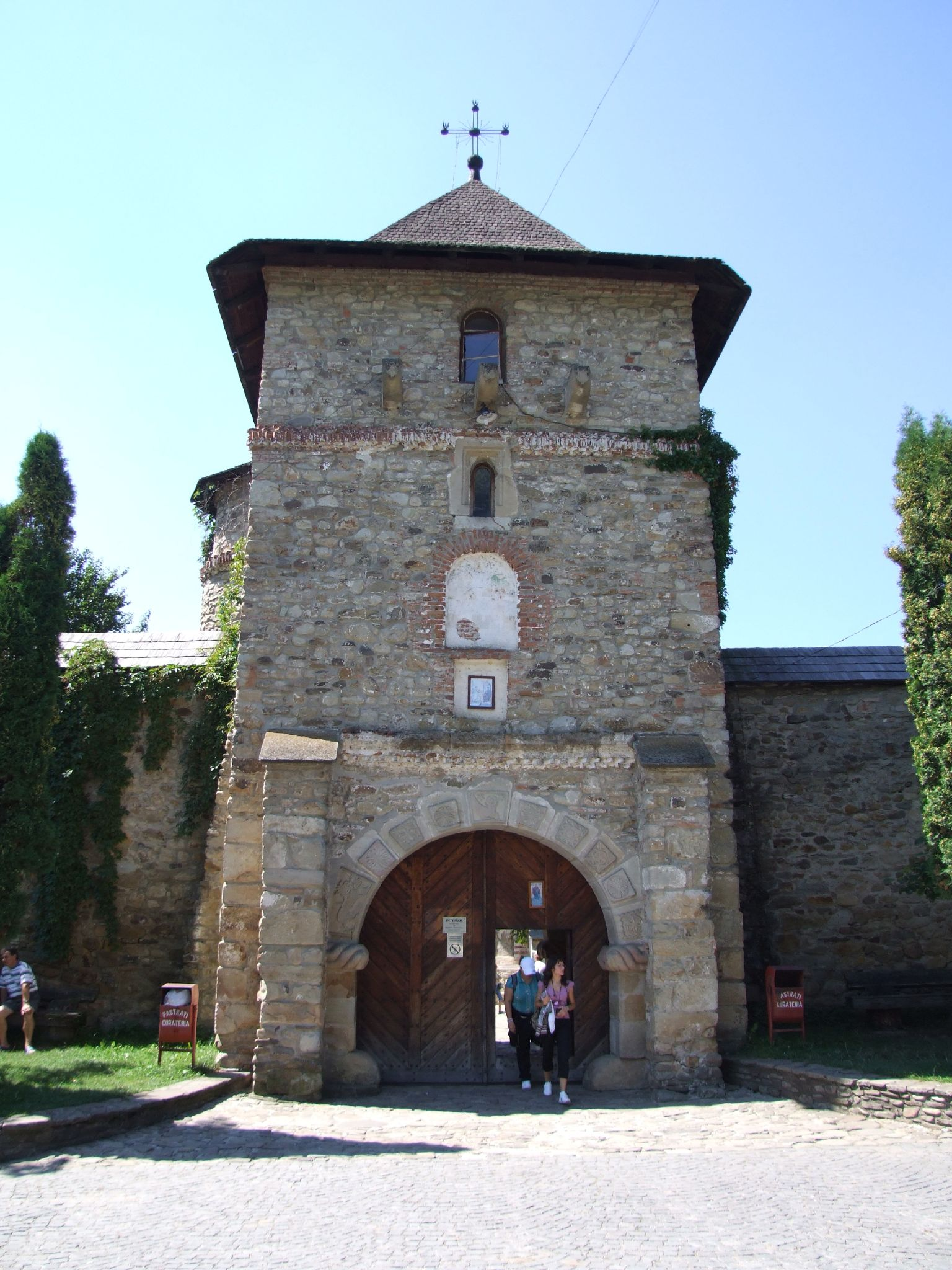 Manastirea Moldovita